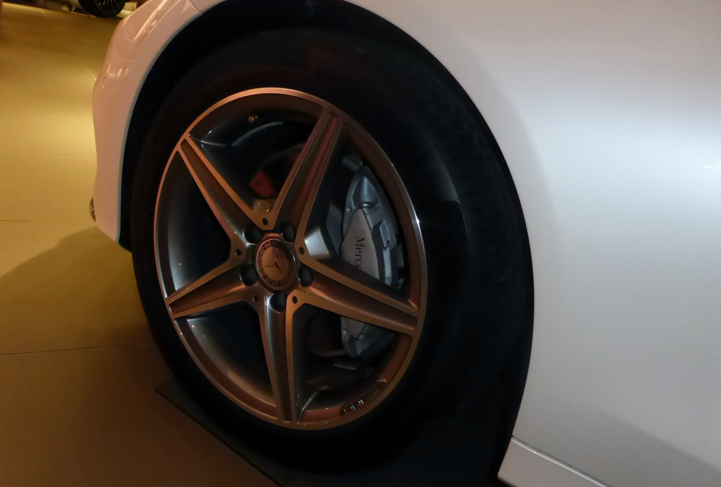 W205型メルセデス・ベンツC180アヴァンギャルドのホイールを撮影。